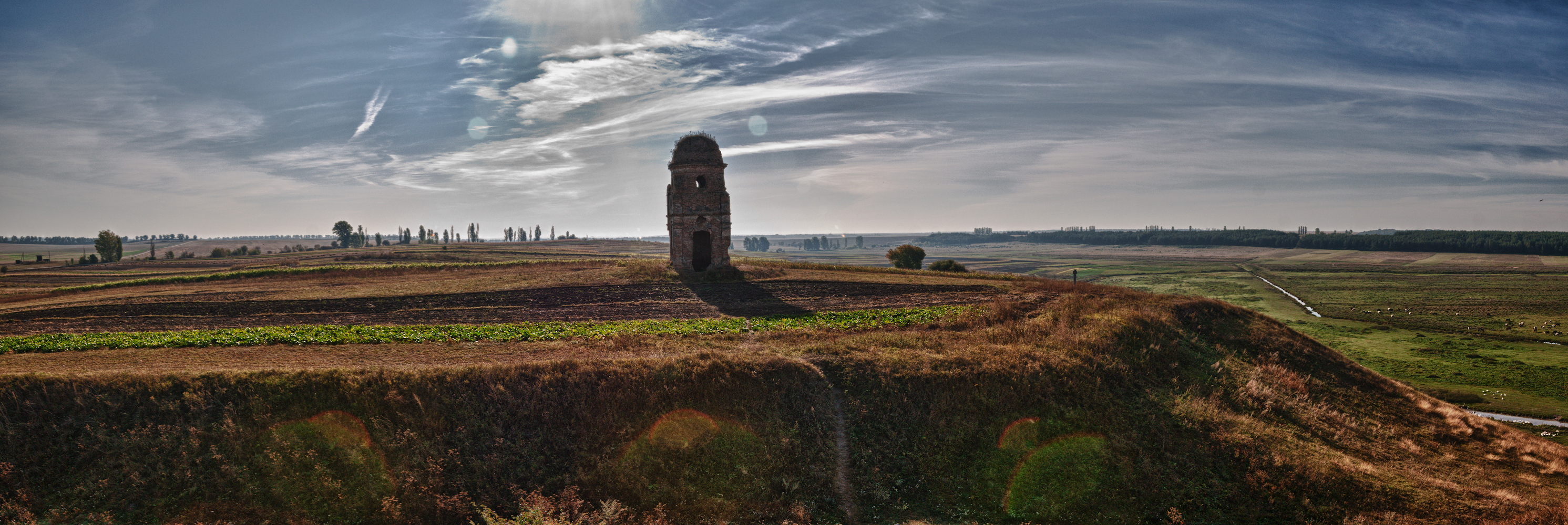 Тихомльське городище з руїнами фортеці (XII-XVI ст.) в селищі Ямпіль